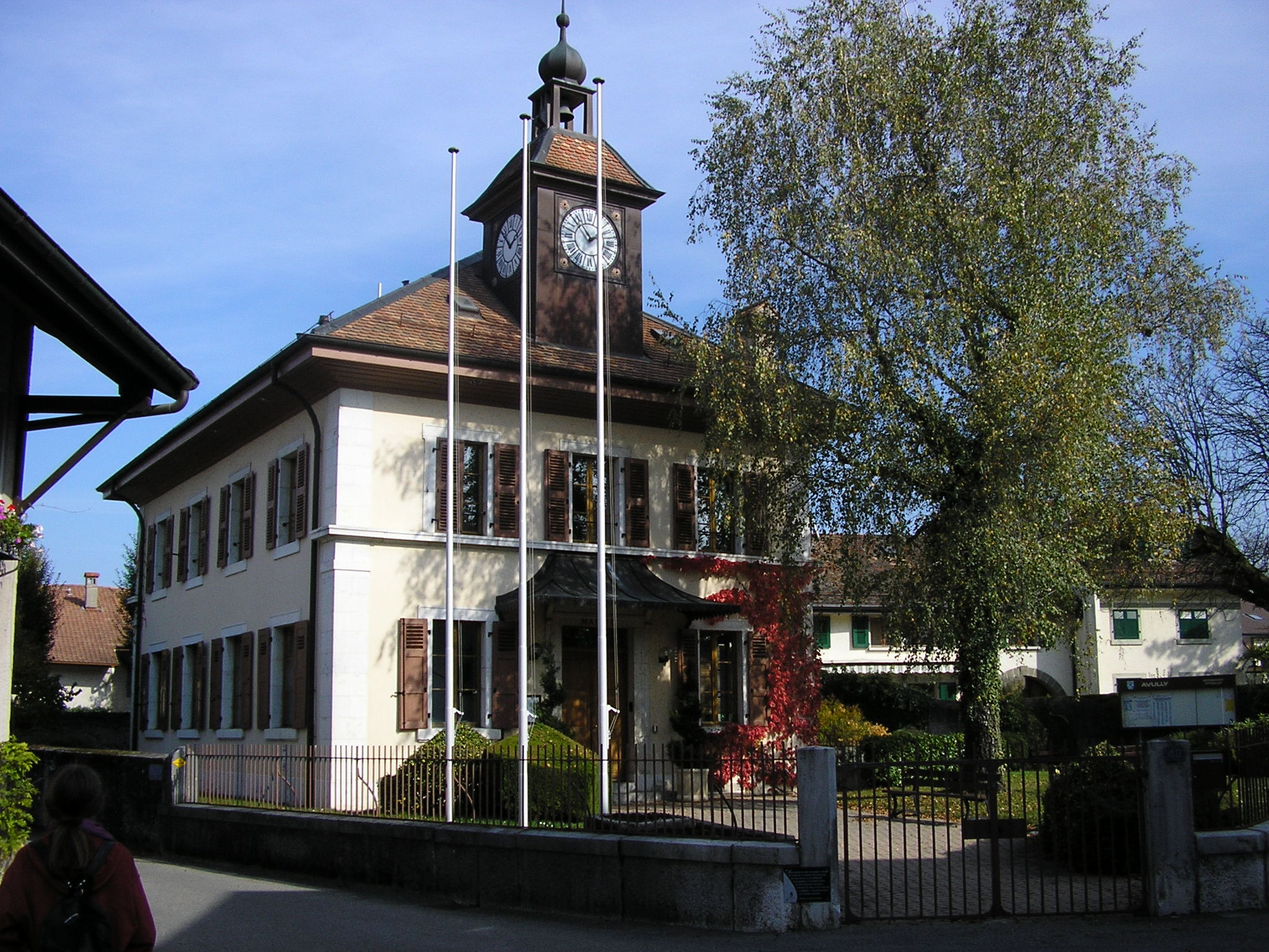 Mairie d'Avully